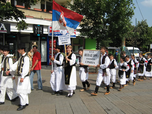 Kud Izbiste